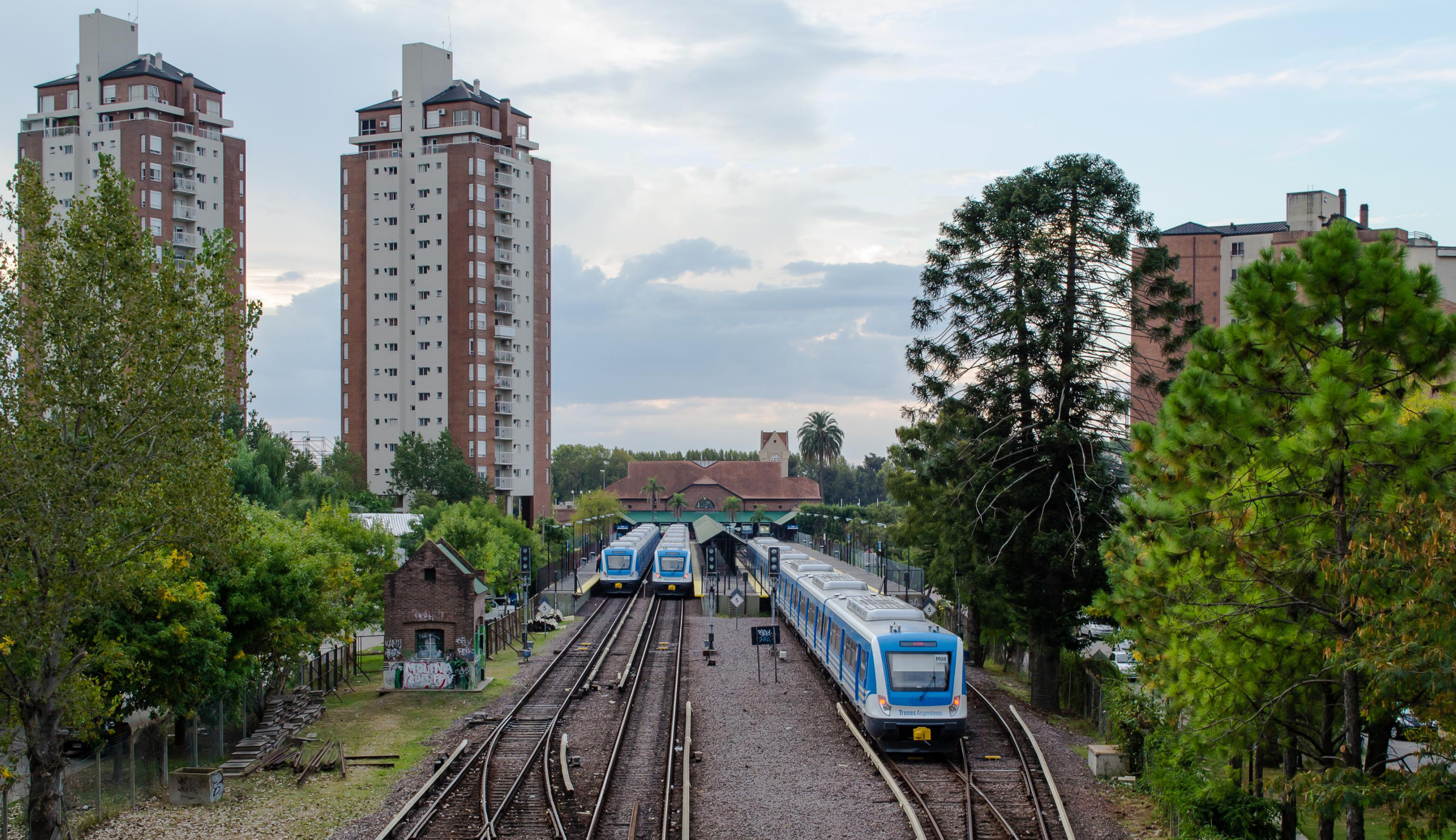 Atardecer en Estación Tigre, con tres formaciones CSR. Las Torres de Tigre (1999) se aprecian a la izquierda.